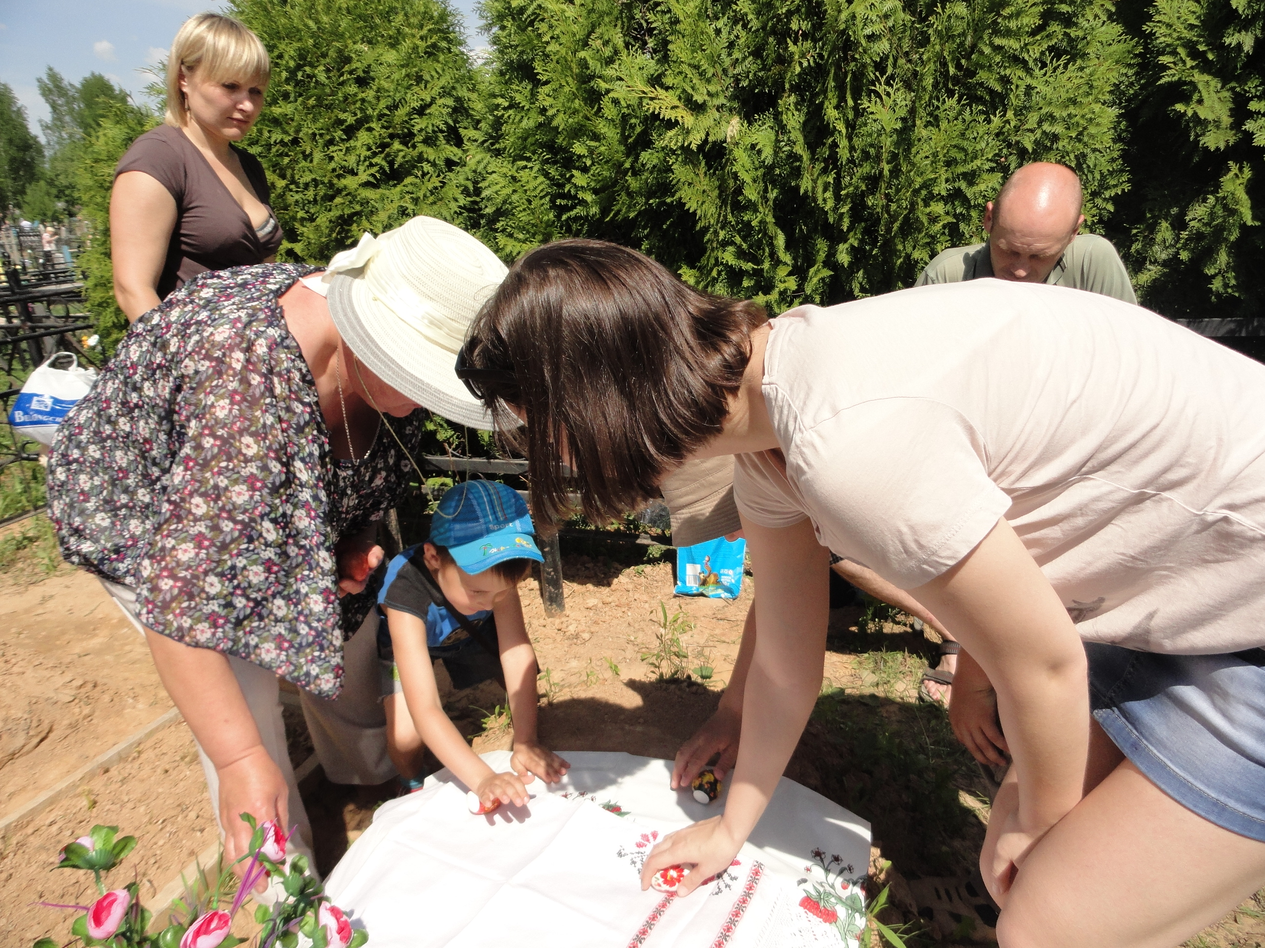 Катание яиц на могилках в Раданицу